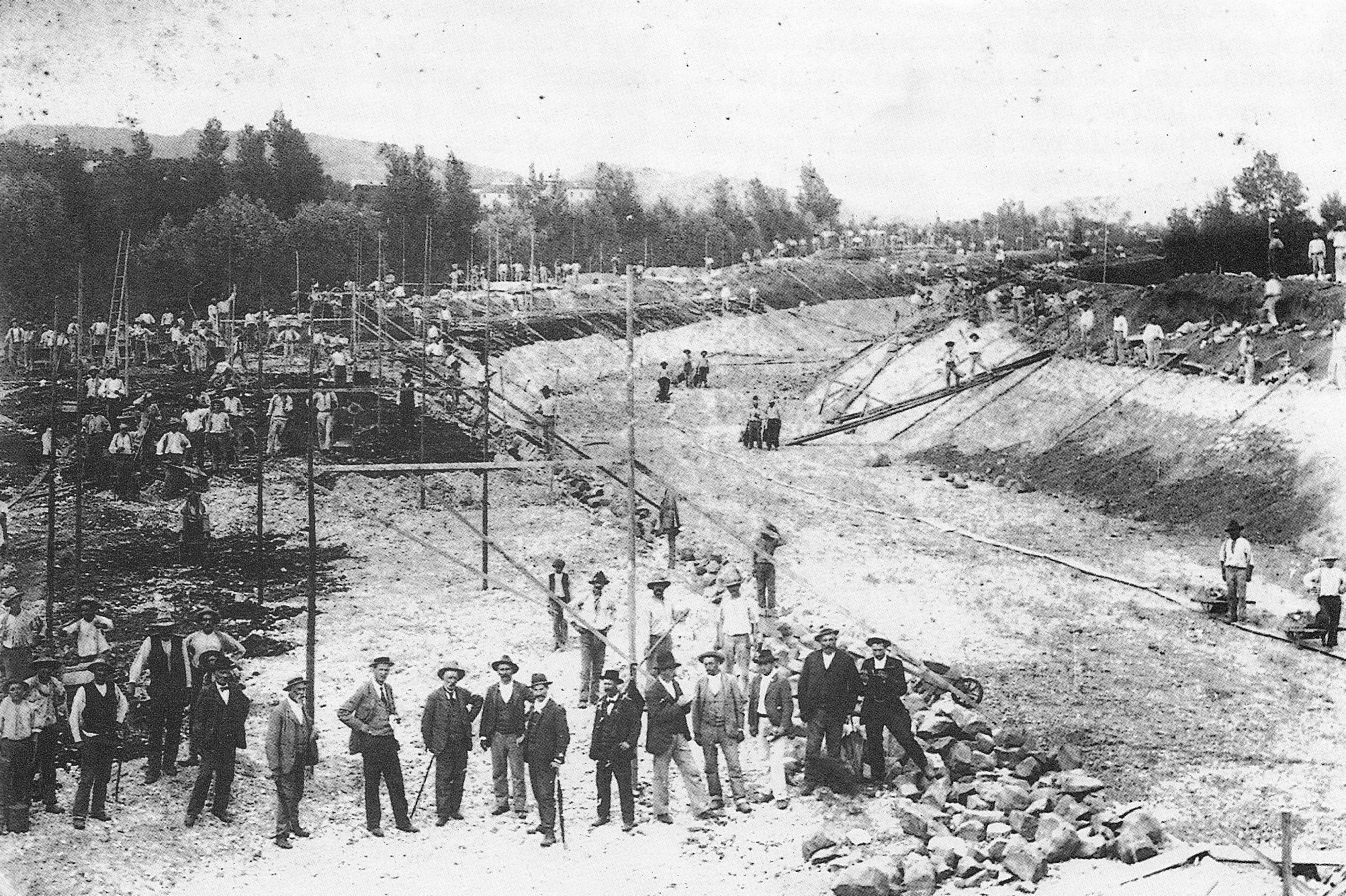 La popolazione di Brendola ripara l'esondazione del Brendola del 1882.